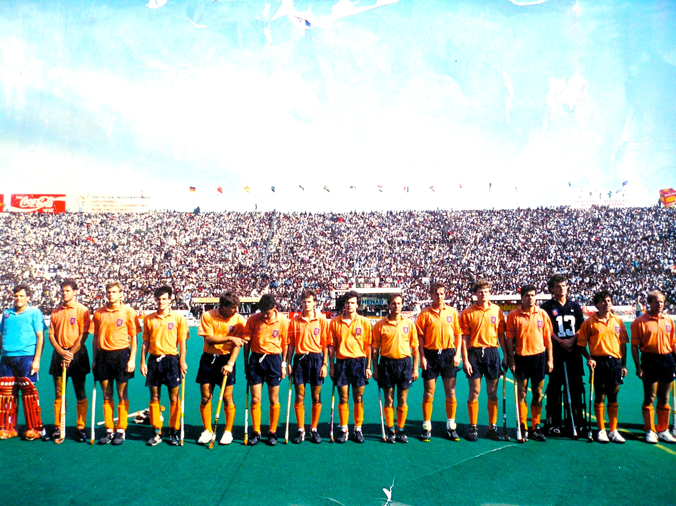 Line up before Final